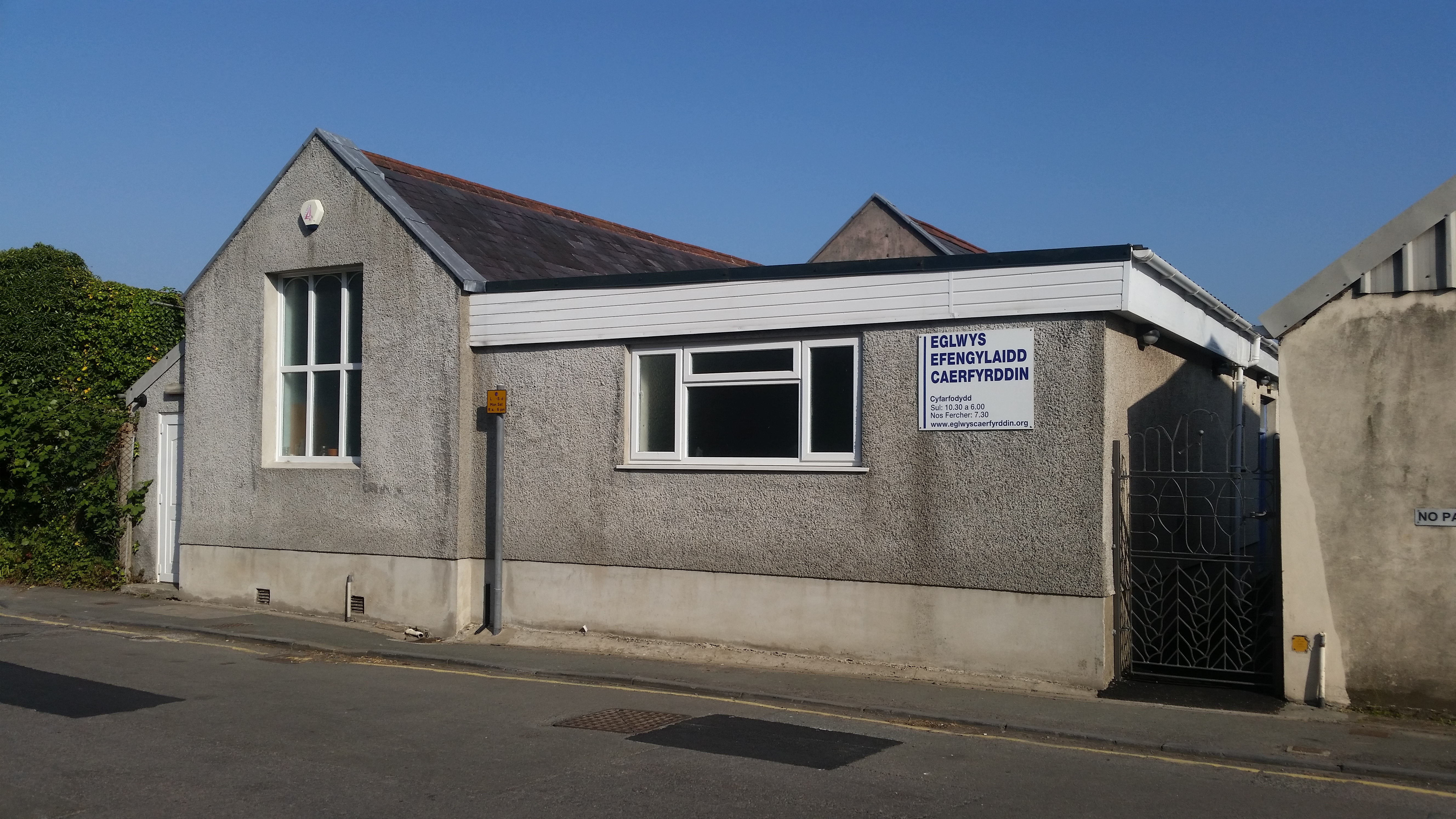 Capel yn Heol yr Hen Orsaf